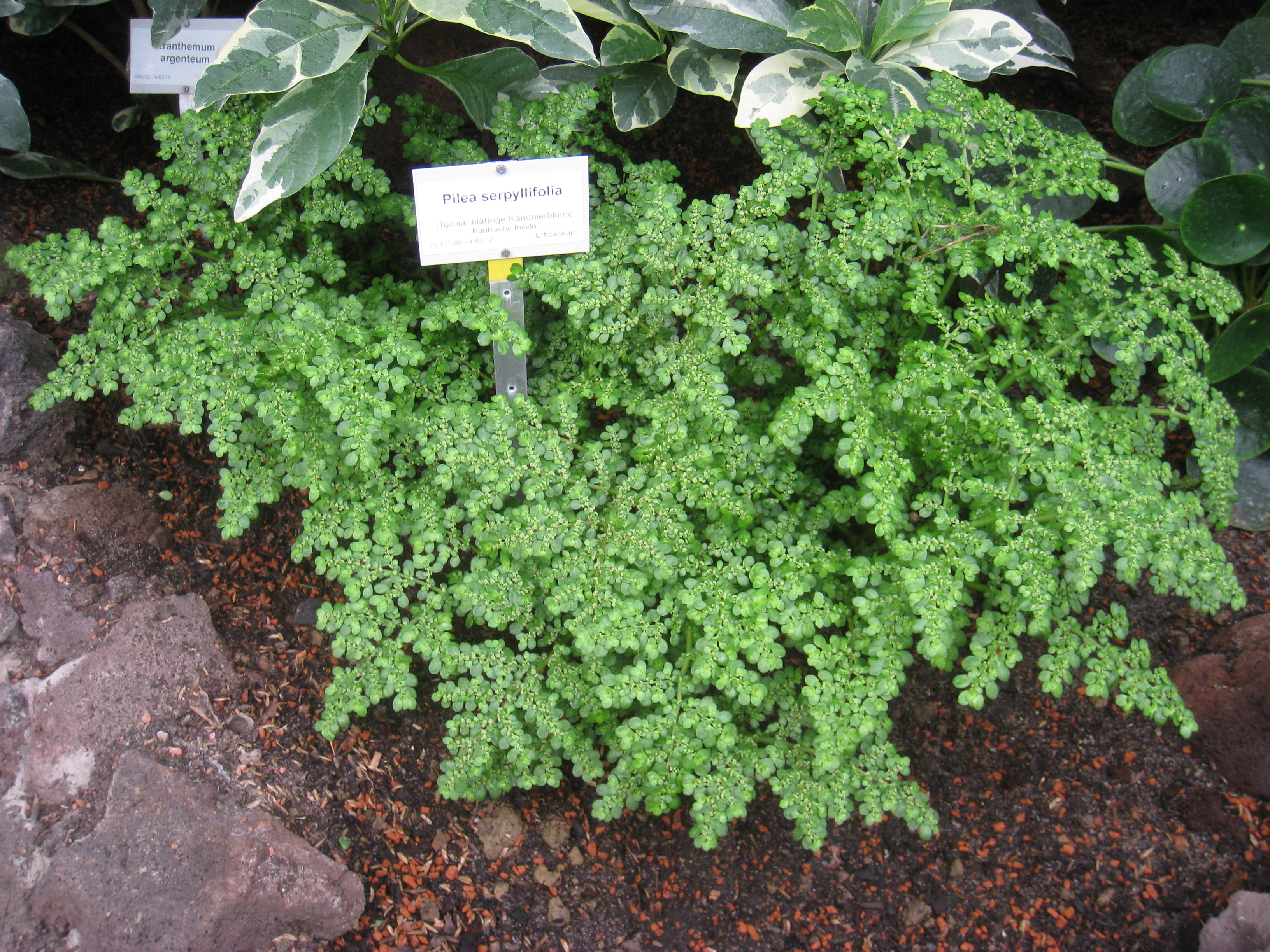 Pilea serpyllifolia specimen in the Botanischer Garten, Berlin-Dahlem (Berlin Botanical Garden), Berlin, Germany.